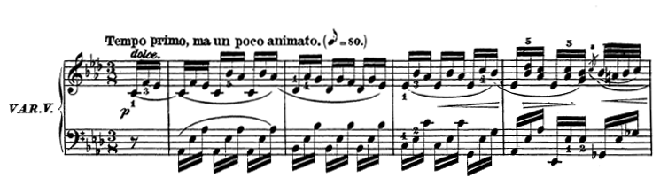 Compassos iniciais do primeiro movimento da Sonata Op. 26 de Beethoven - Variação V